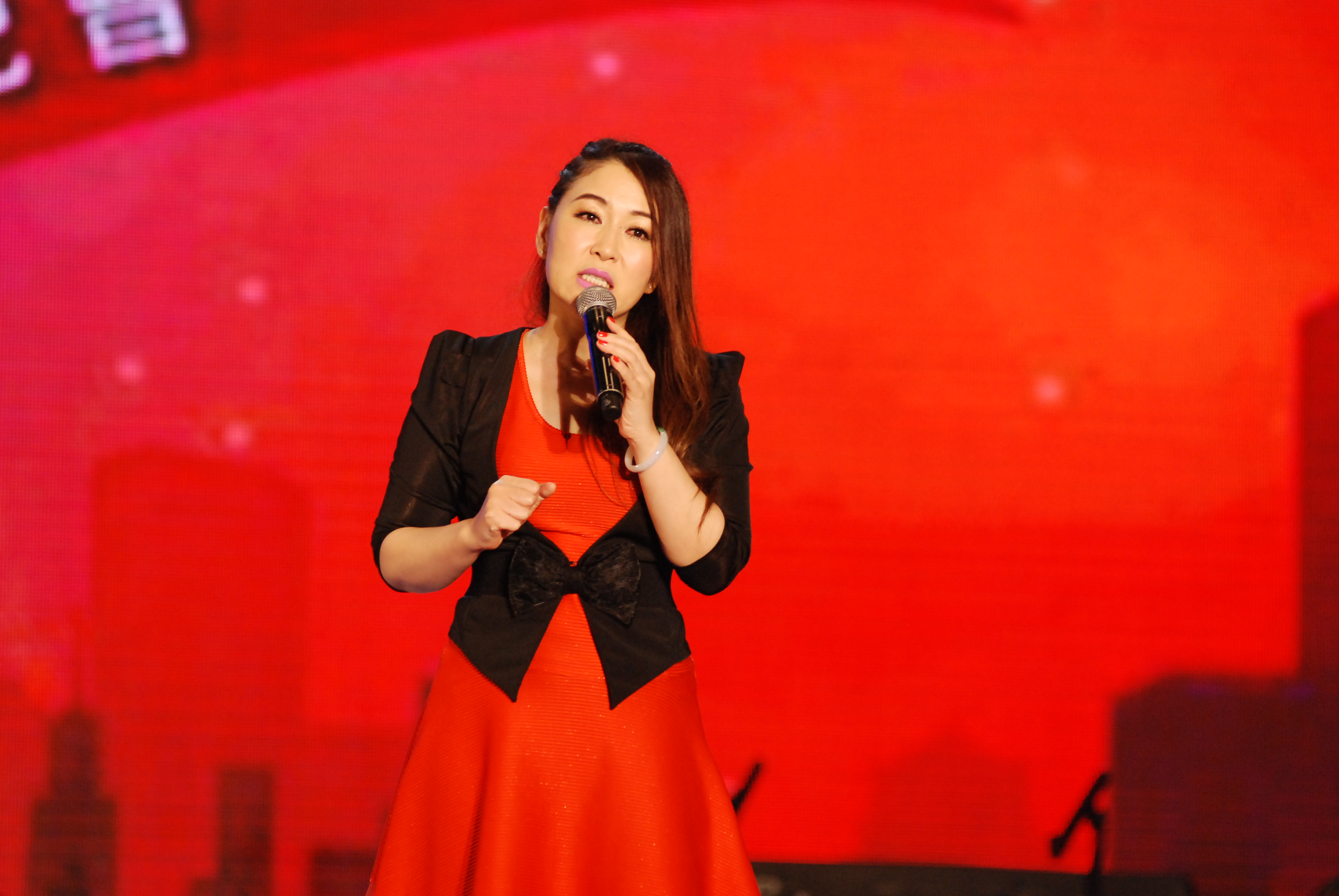 中文（台灣）: 張秀卿3.jpg